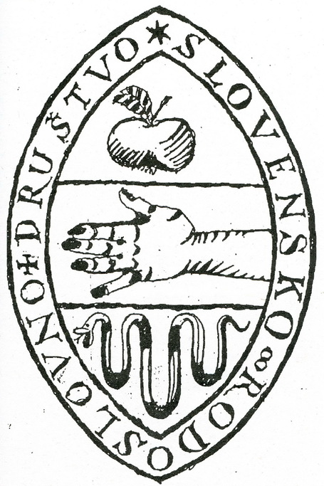 grb društva SRD